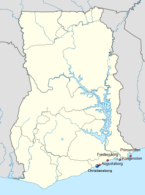 Principales enclaves de la Costa de Oro danesa. A partir de File:Ghana location map.svg